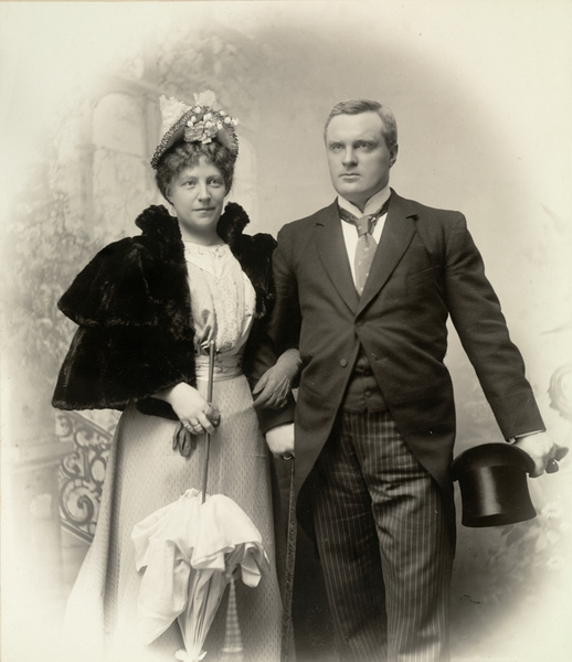 dobbeltportrett, kvinne, mann, skuespiller, sceneinstruktør, teatersjef, stående knefigur. Jenny Bjørnson, f. Sandberg, var Bjørn Bjørnsons første hustru. Gift 1886, skilt 1890.